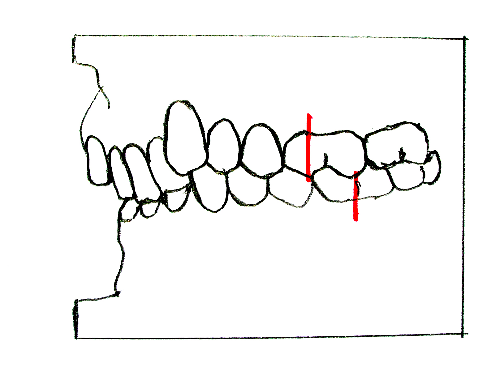 Zahnbeiehungen nach Angle Klasse II/2